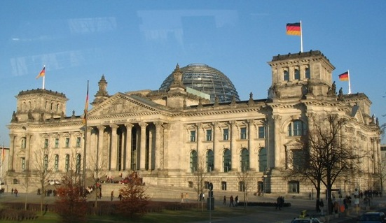 德国国会大厦，曾毁于火灾（国会大厦纵火案），后重新修葺。